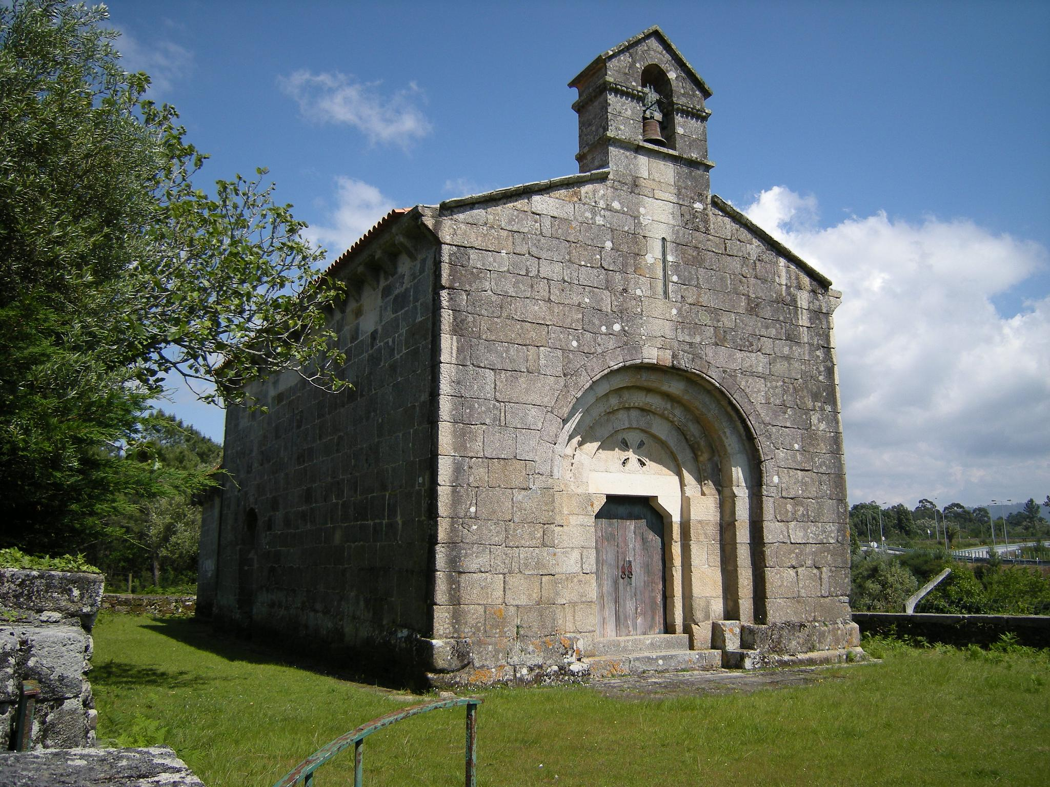 Iglesia con planta de nave única y ábside rectangular, datada en torno al año 1145.